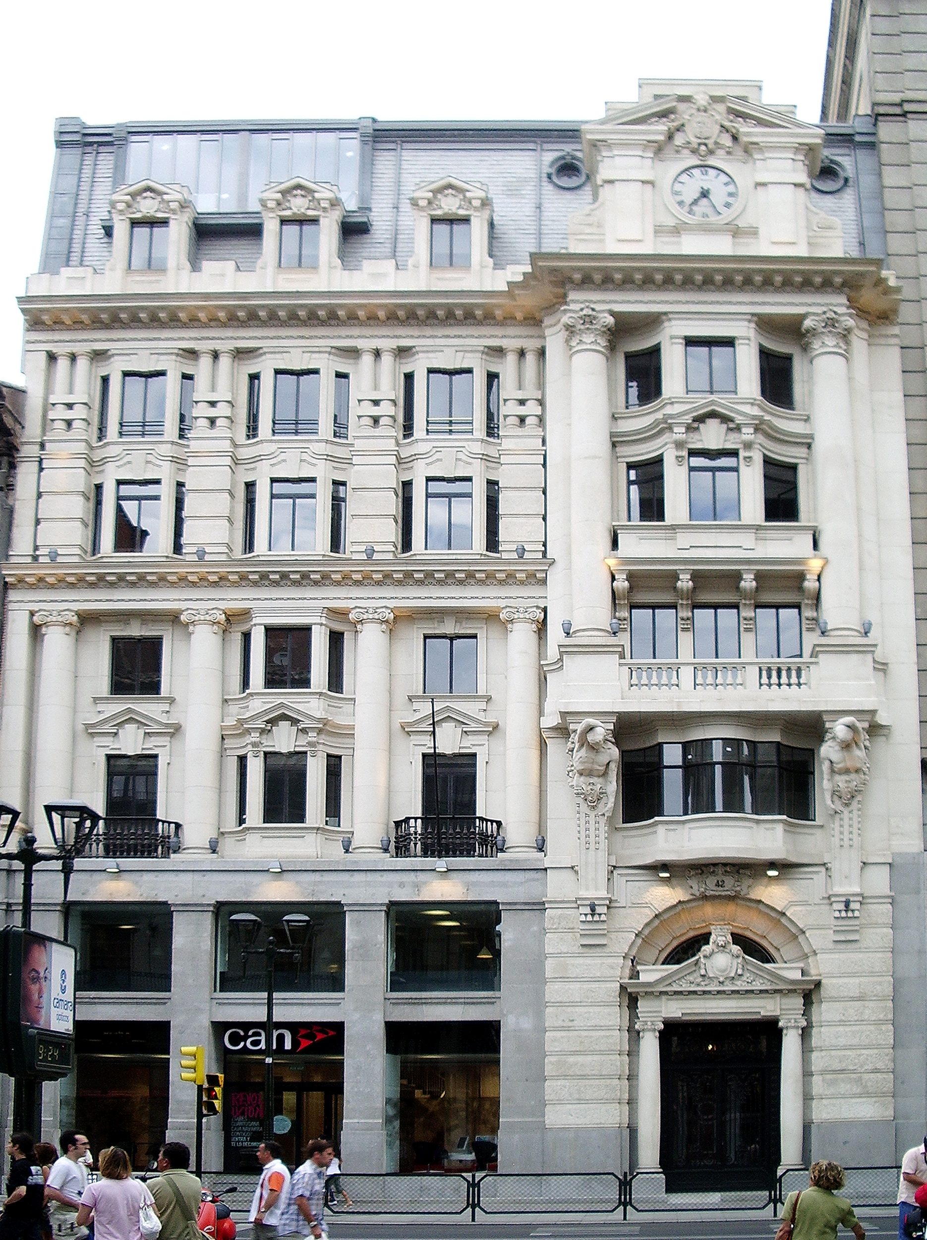 Antiguo Banco de Aragón (Zaragoza, España), Eclecticismo, 1913. Calle Coso 42. Arquitecto: Manuel del Busto.